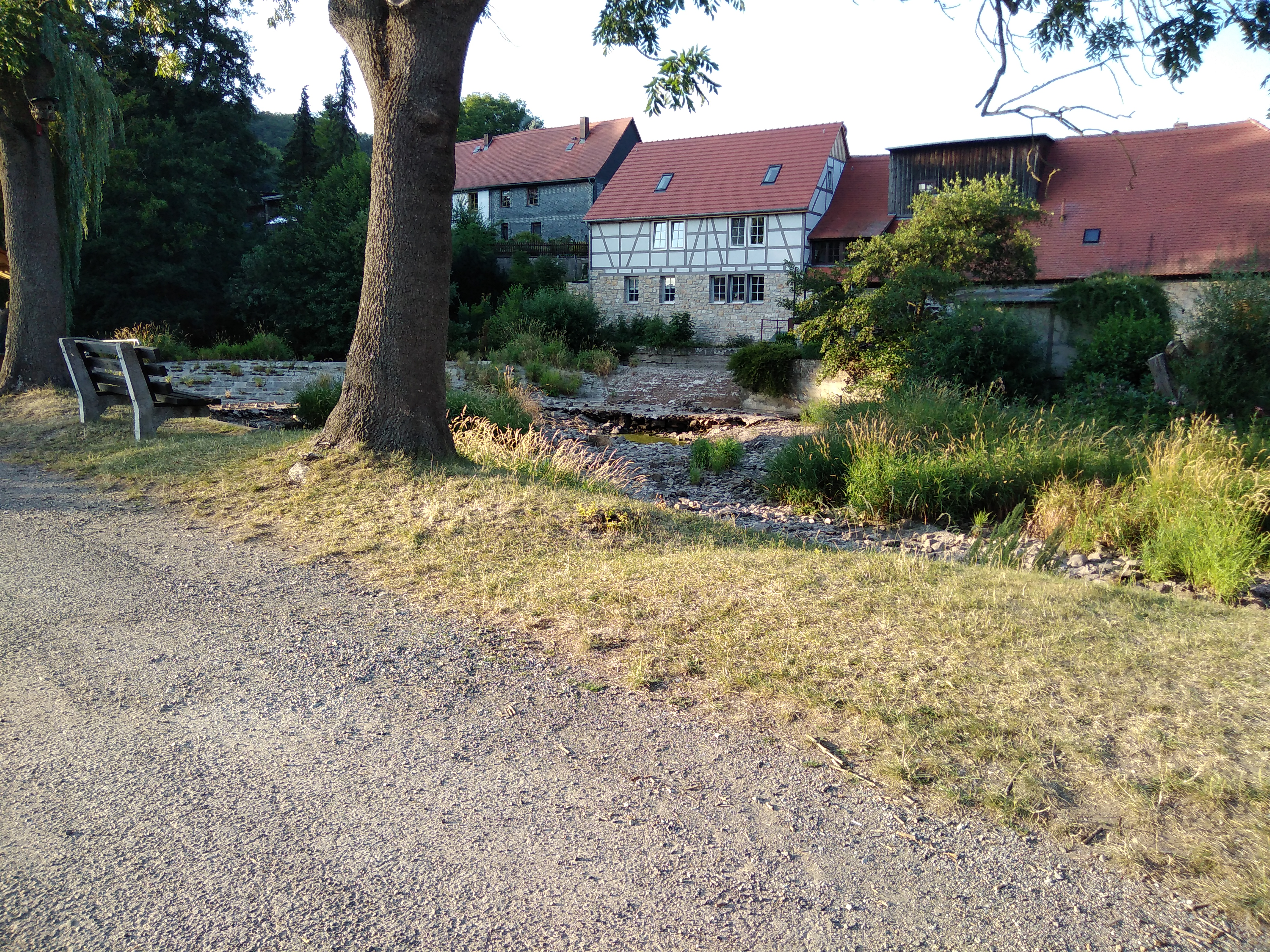 Ilm bei Buchfahrt